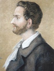 Ludwig Leichhardt (1813–1848), by Friedrich August Schmalfuß, as copied by Elisabeth Wolf